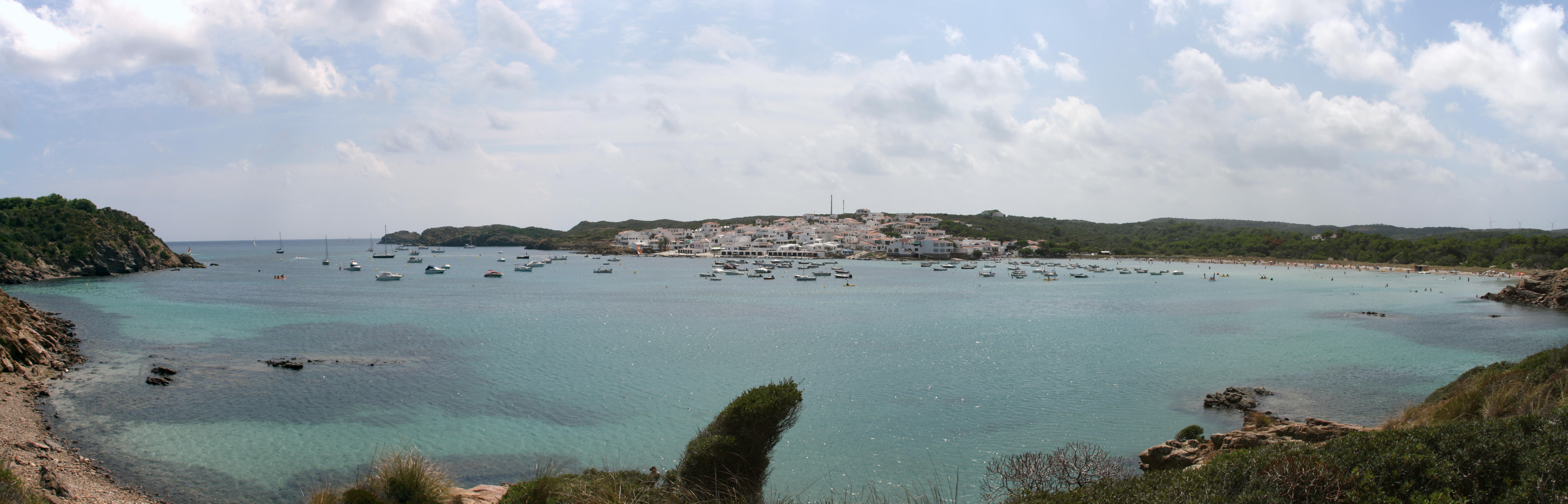 Bahía d'es Grau This is a photography of a Site of Community Importance in Spain with the ID: ES0000234. Natura2000 entry, EEA entry